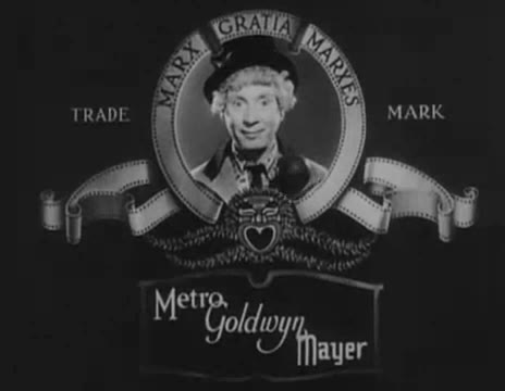 Imatges extretes del Tràiler de la pel·lícula Una nit a l'òpera dels Germans Marx.